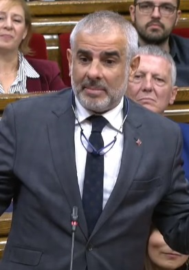 Carlos Carrizosa en el Parlamento de Cataluña.